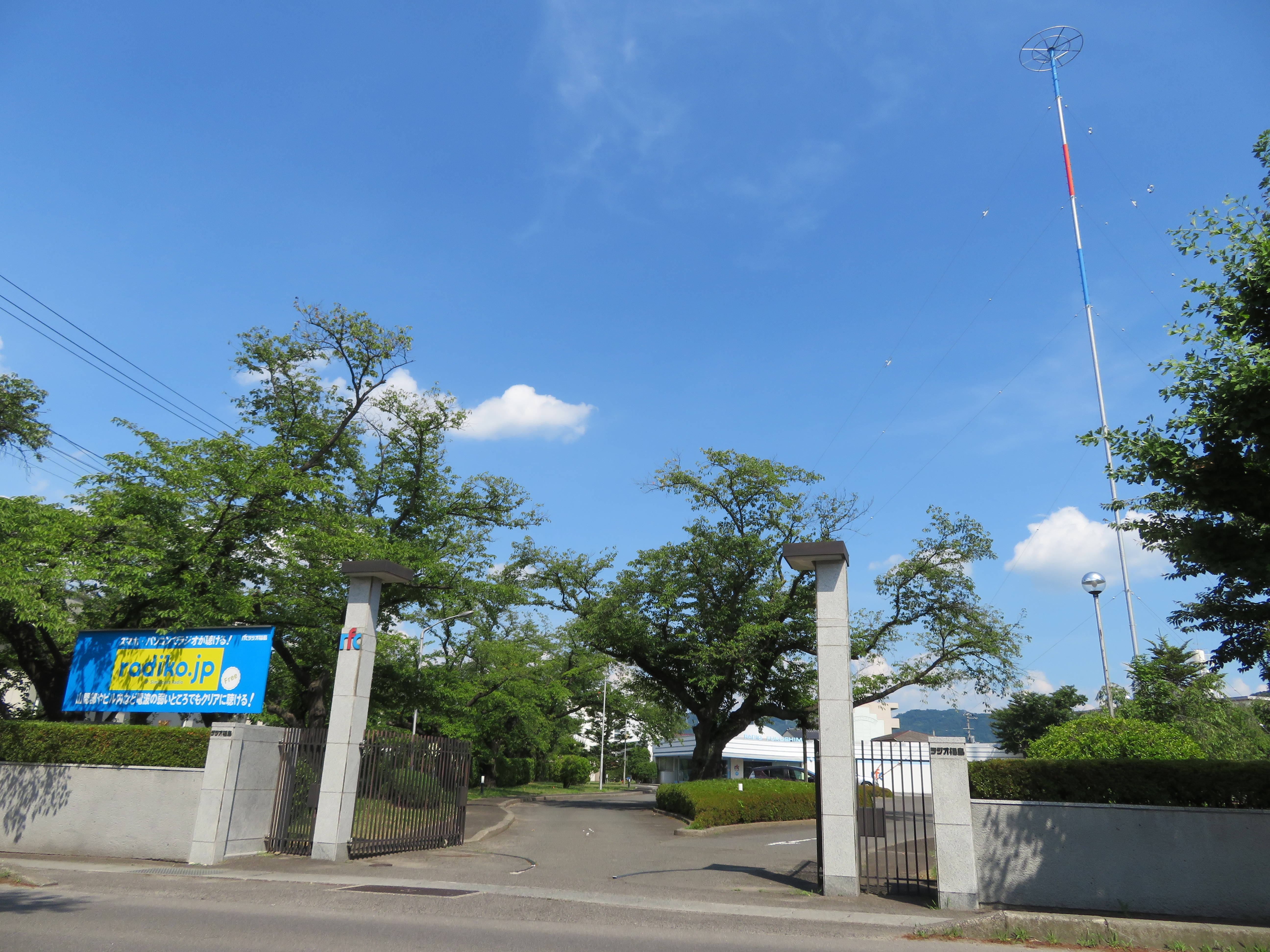 ラジオ福島本社・送信所（社屋を中心に撮影） Canon PowerShot SX720 HS